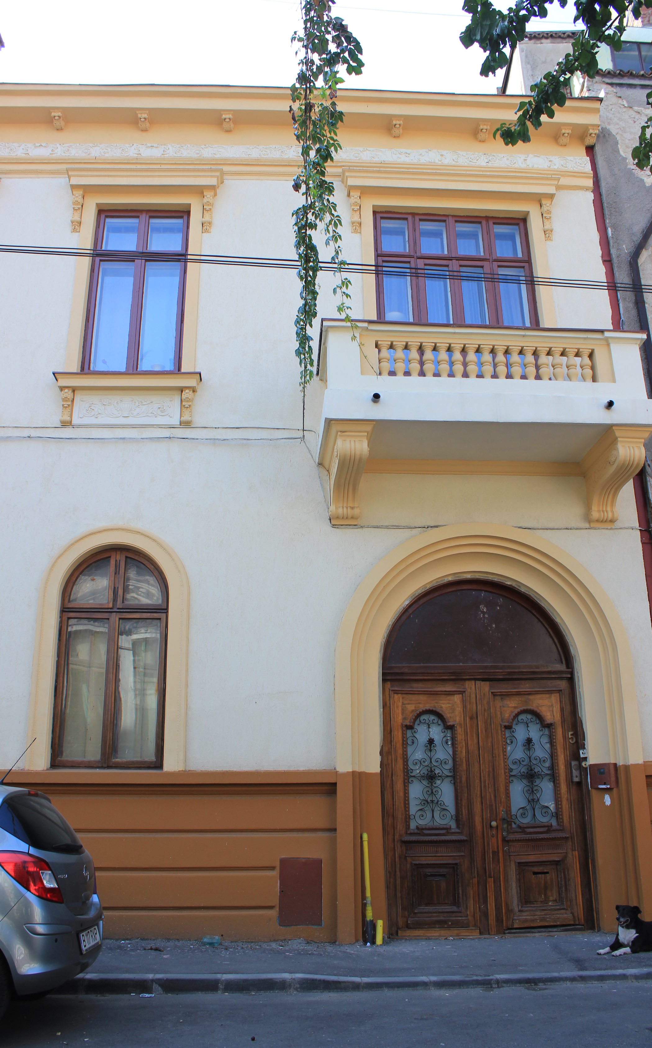 Casă Bocsa 5